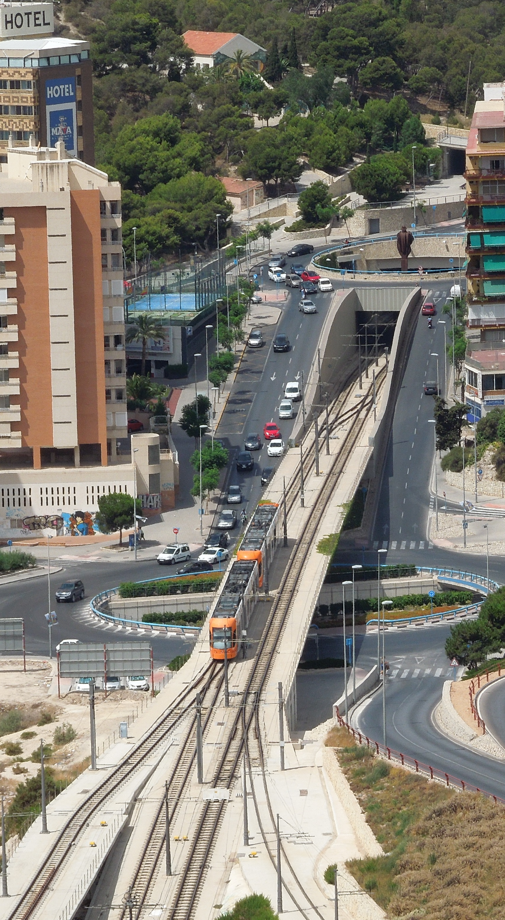 Entrada al túnel urbano de Alicante, común a todas las lineas excepto la L9, tranvia Bomardier en composicion doble partiendo hacia El Campello.